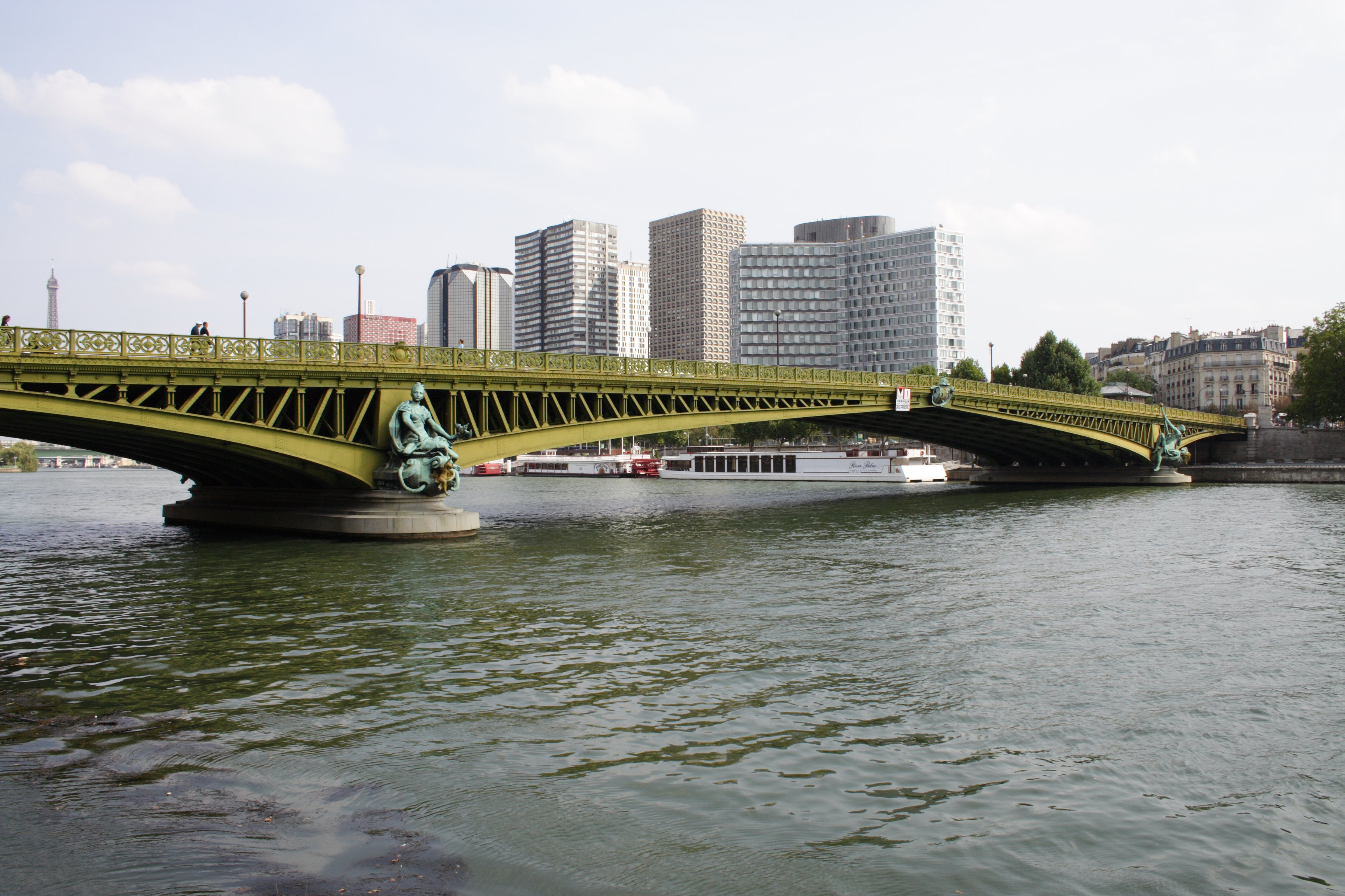 Pont Mirabeau (Paris, France)